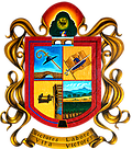 Stemma di Turicato